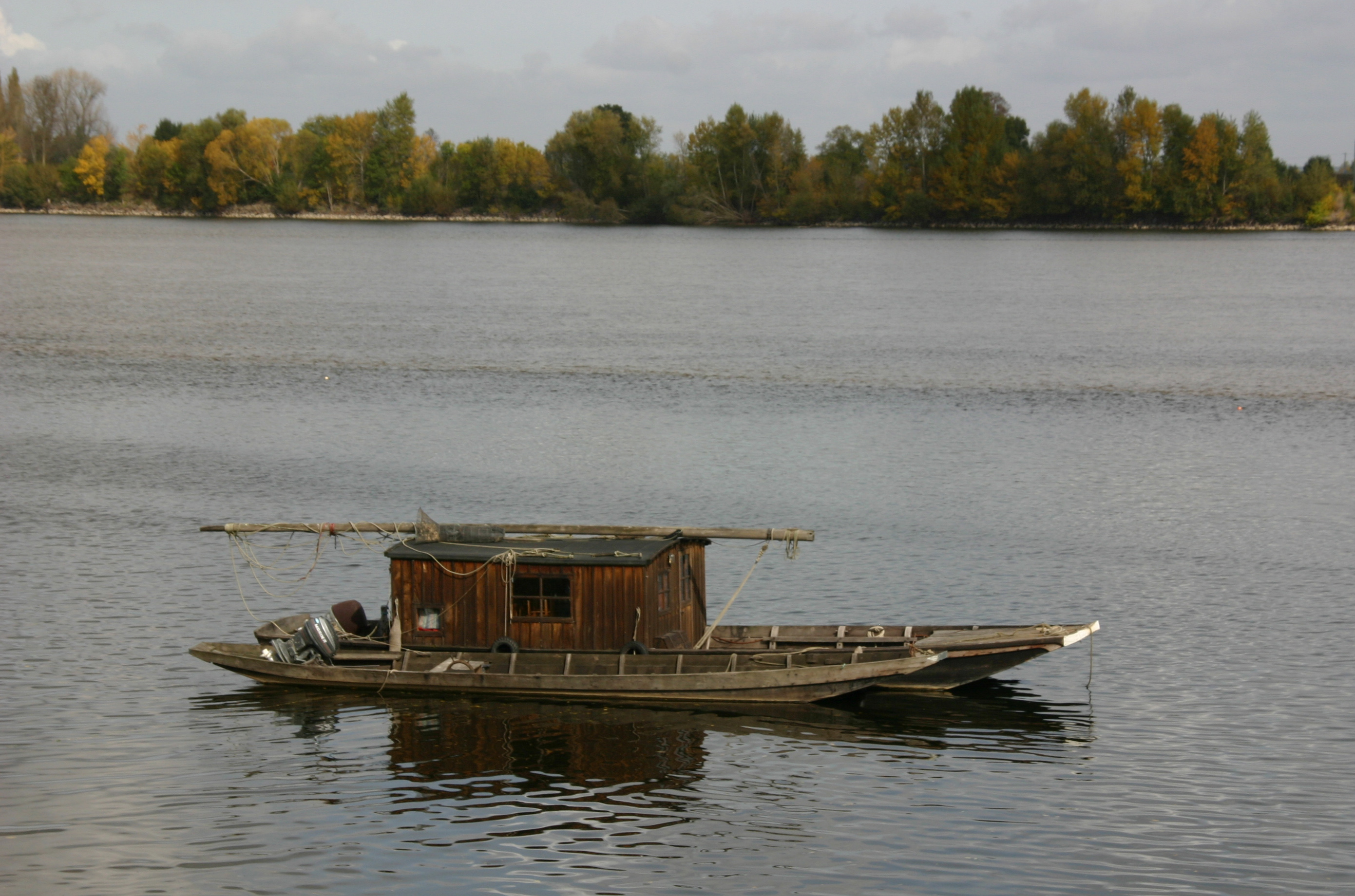 Loire bei Le Thoureil